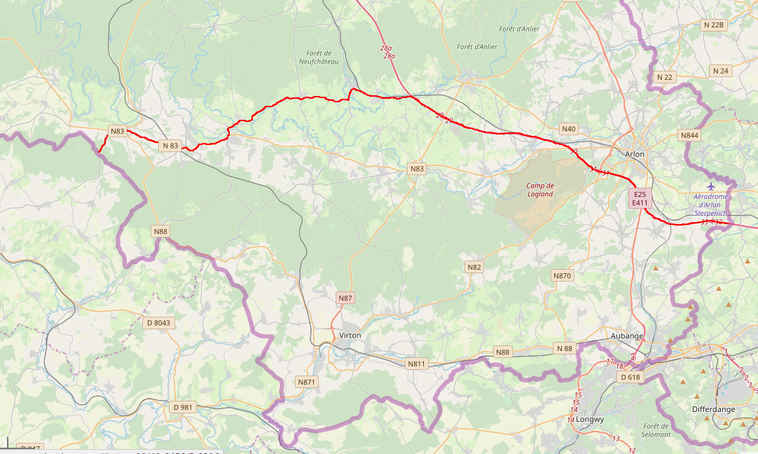 Périmètre d'exclusion de la peste porcine africaine en Belgique, épidémie débutée en septembre 2018, dessiné sur une carte OpenStreetMap